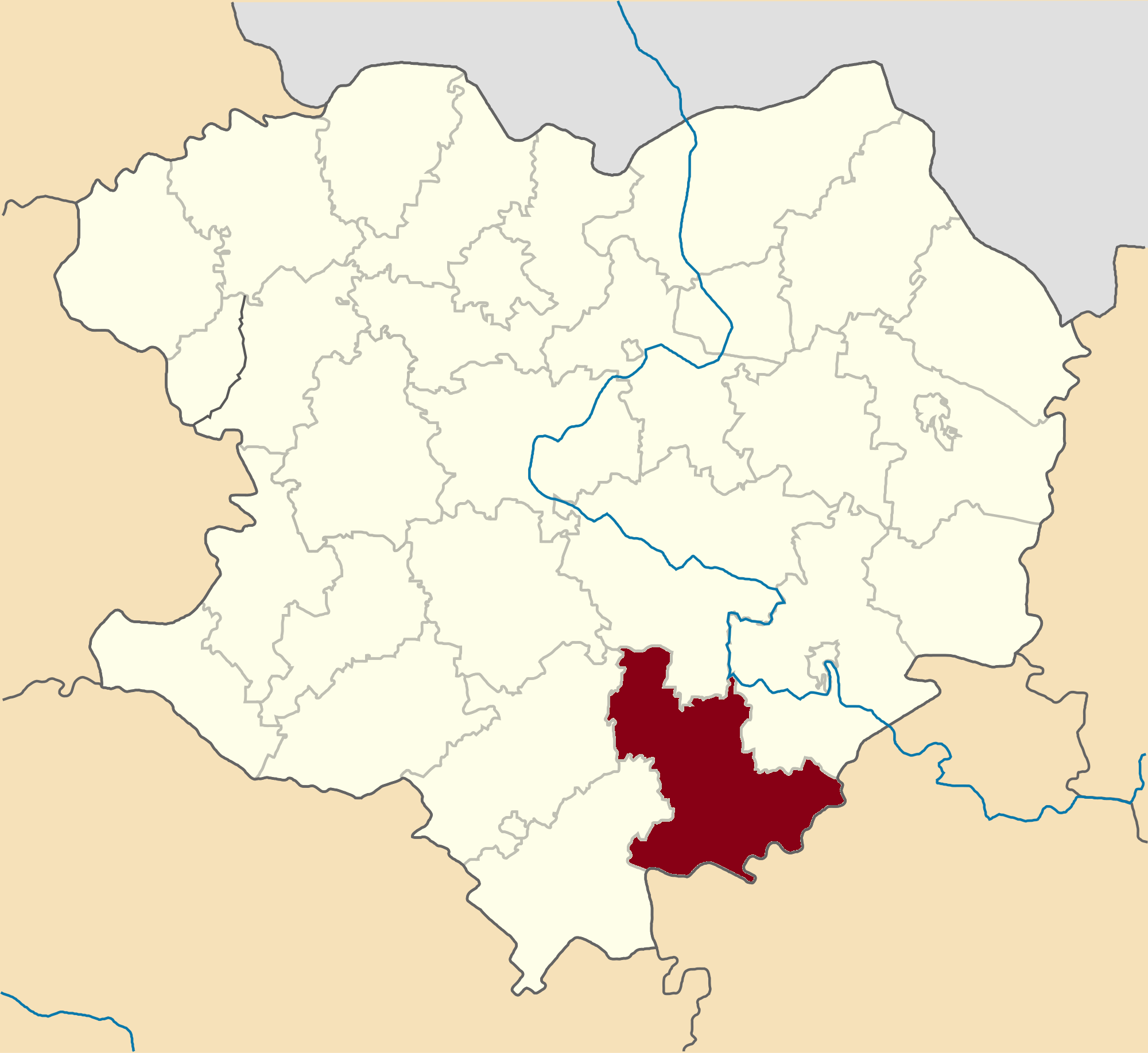 Barvinkivskyi-Raion map